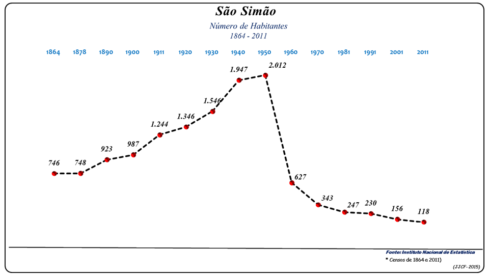 Evolução da População